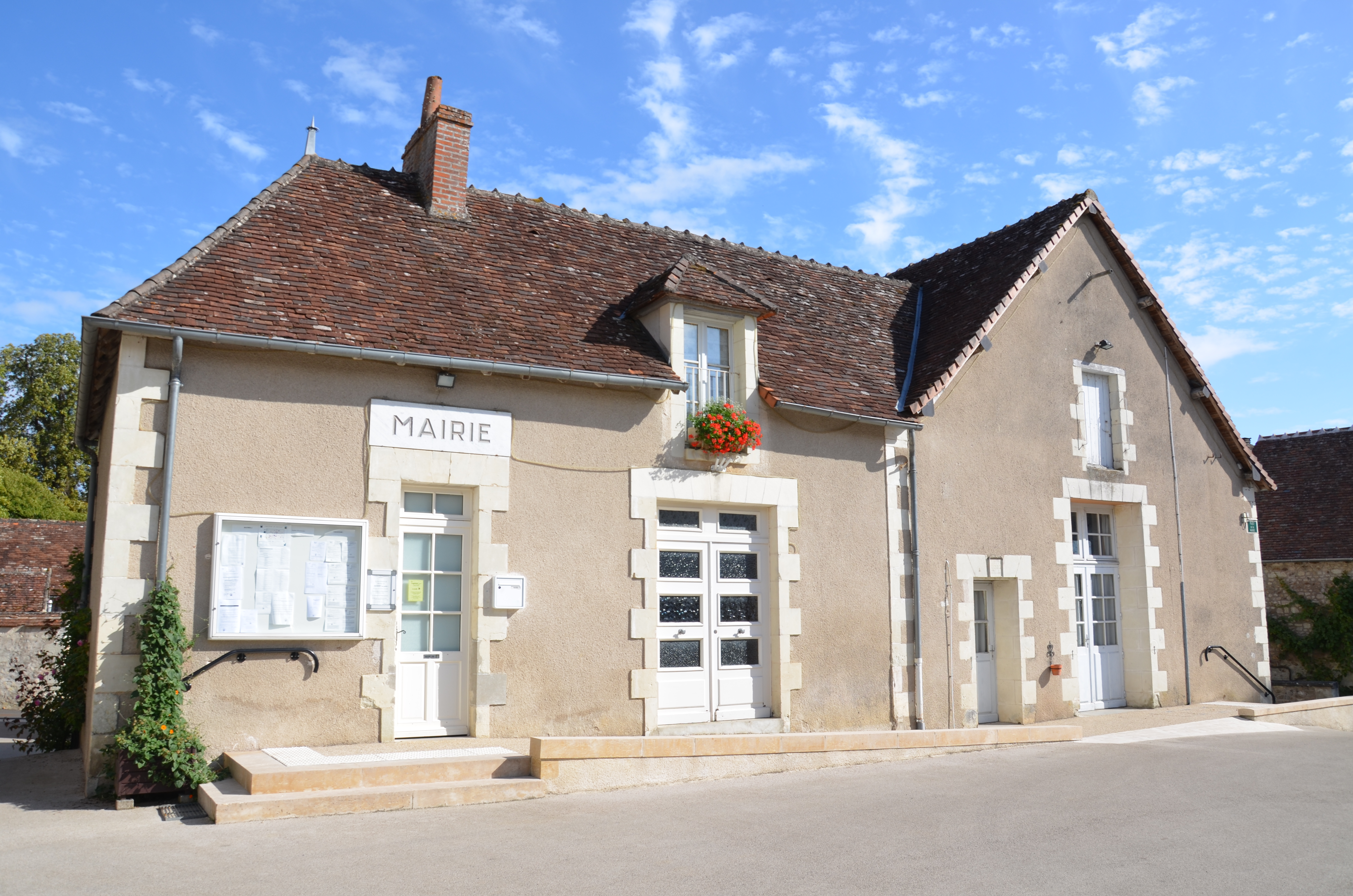 Mairie de Boussay (Indre-et-Loire, France).